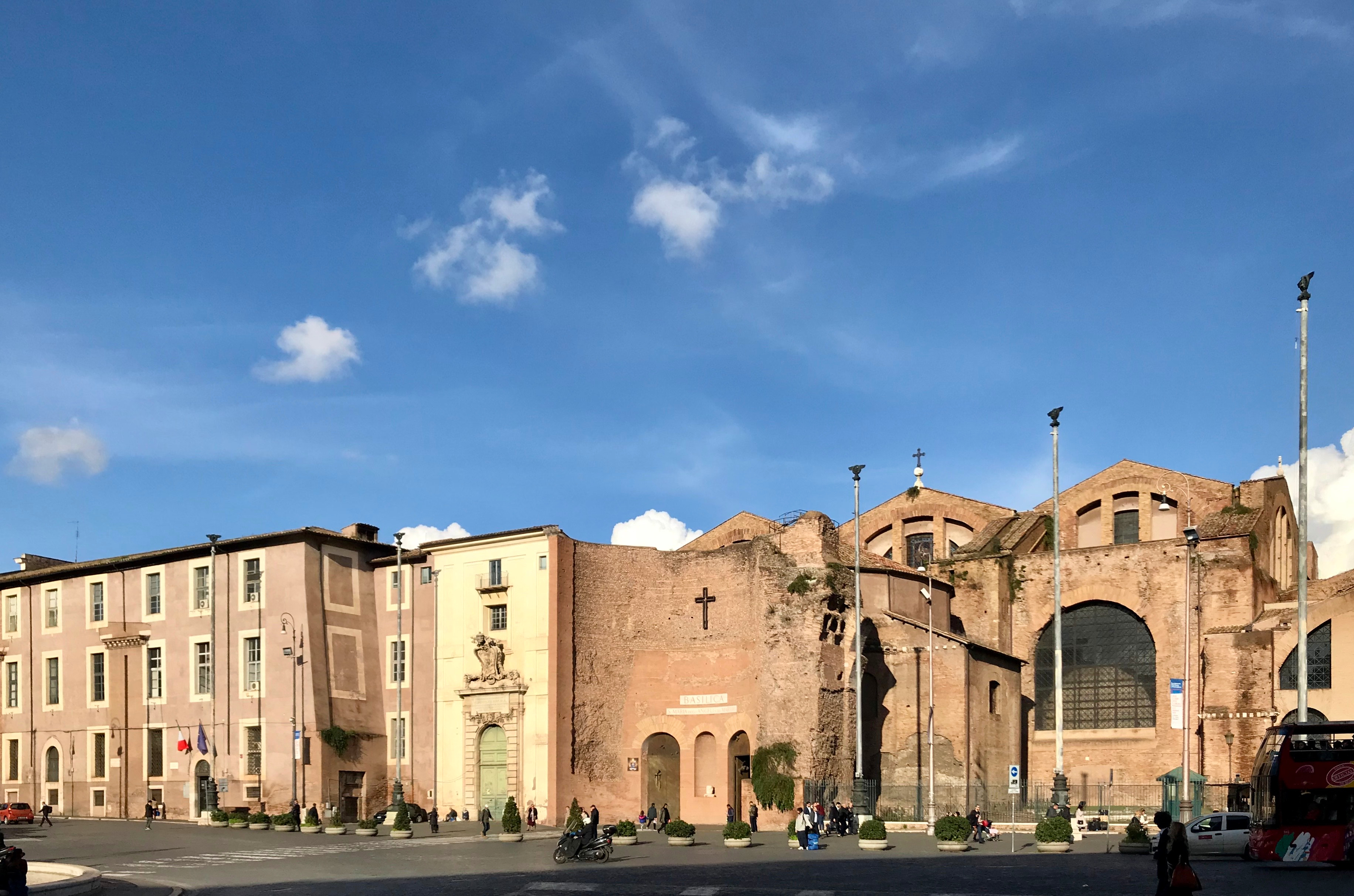 Basilica di Santa Maria degli Angeli e dei Santi in Rome